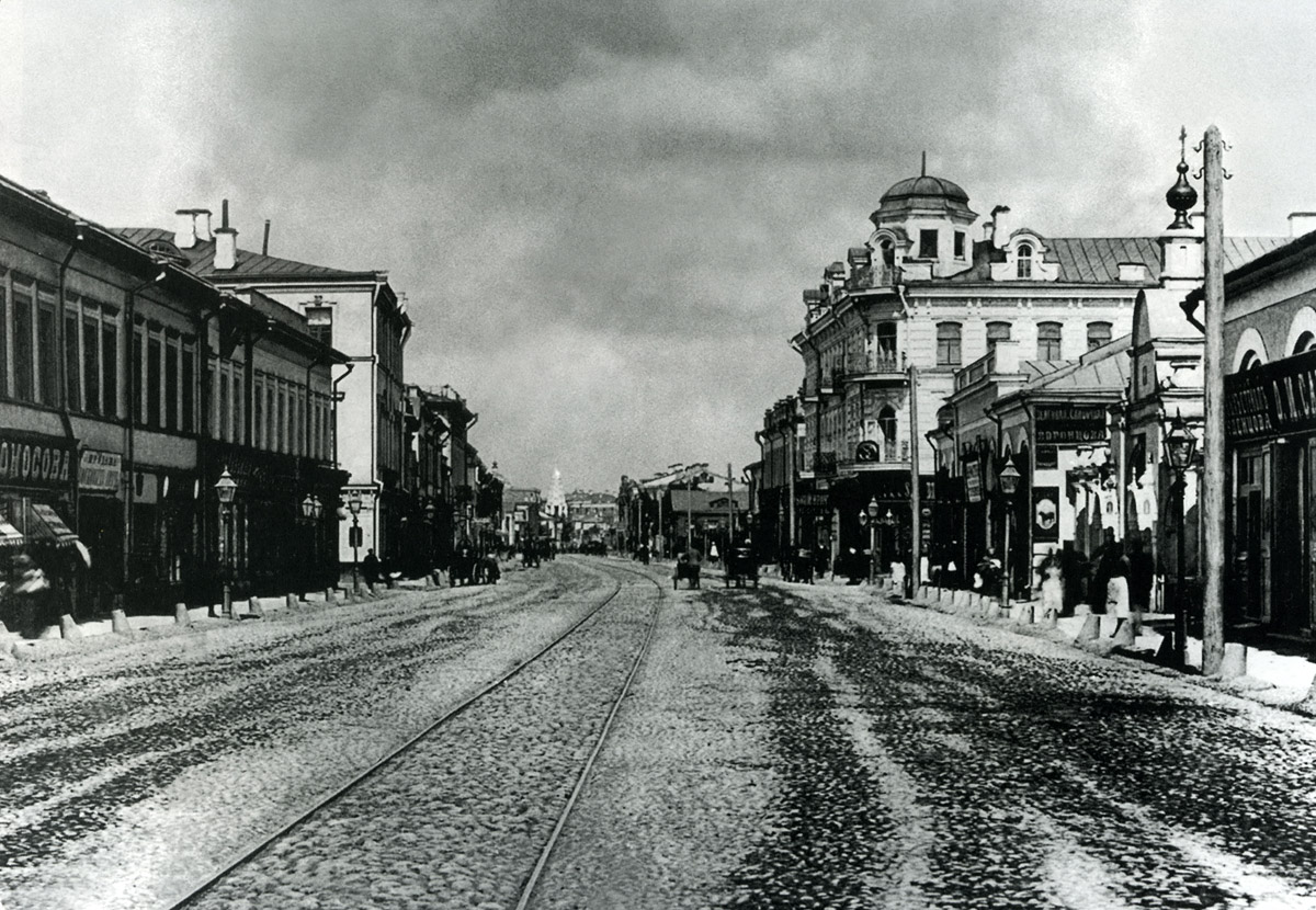 Arbat Street in 1890s